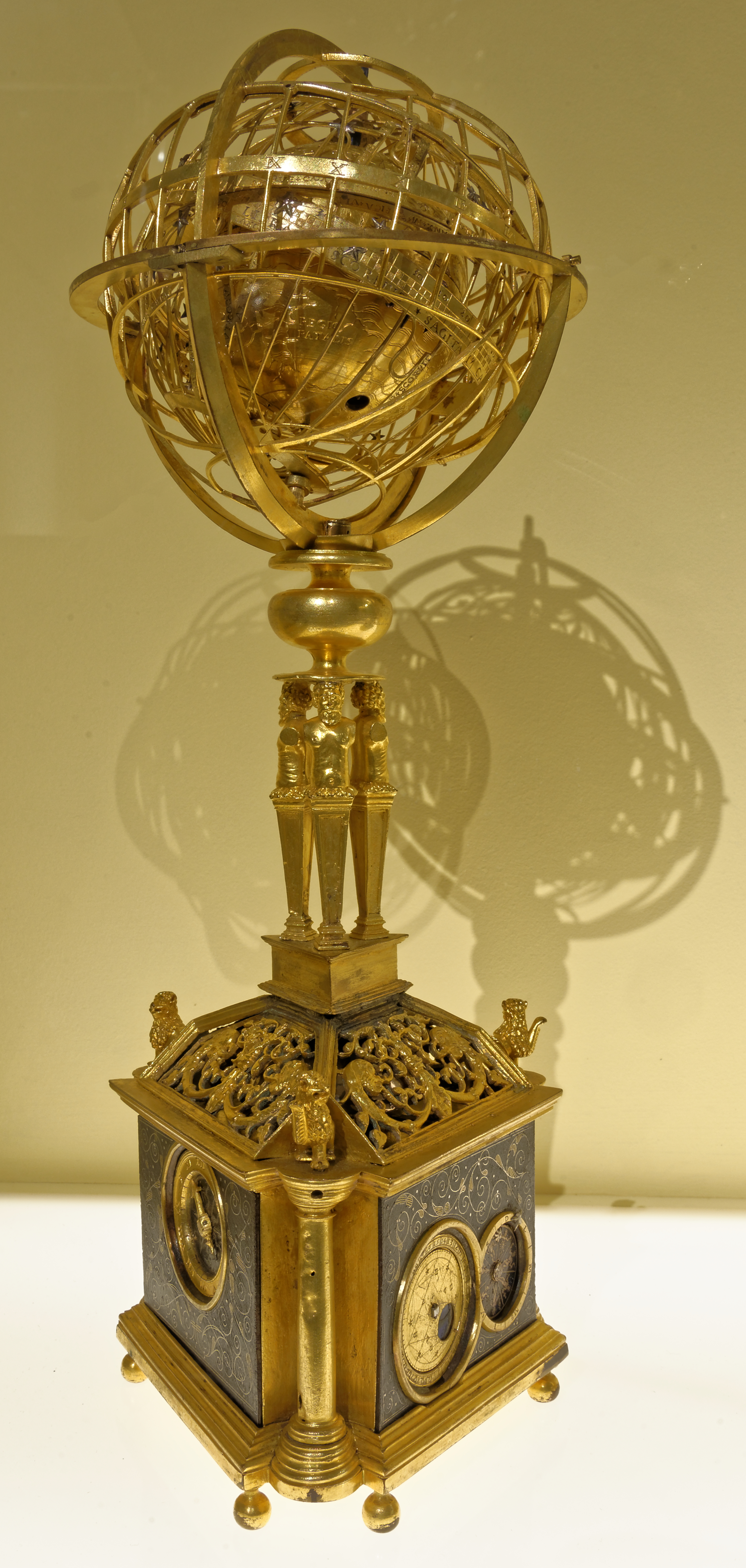 Jean Naze Horloge astronomique avec sphère céleste mécanique, 1550 ( ?) Laiton doré ciselé et gravé, bronze doré, fer, argent. H. 32,2 ; l. 8,3 ; D. globe 13 cm Inscription : I. NAZE ALION D L CORDELIERS Cassel, Museumslandschaft Hessen Kassel, Astronomisch-Physikalisches Kabinet, inv. APK U 45 Exposition : Lyon Renaissance. Arts et humanisme.